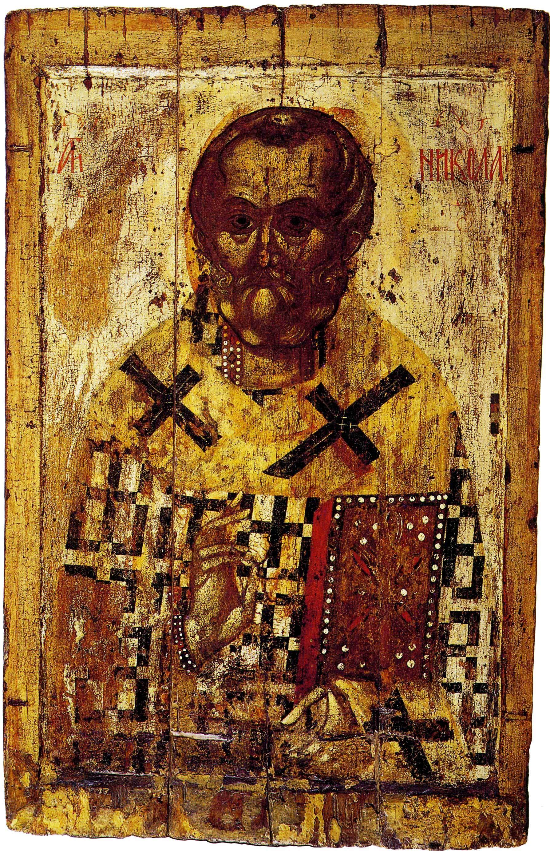 Николай Чудотворец, поясной, из одного из храмов Мологи Школа или худ. центр: Ярославль Первая половина XIV в. 114 × 74 см Государственная Третьяковская Галерея, Москва, Россия Инв. ДР-47